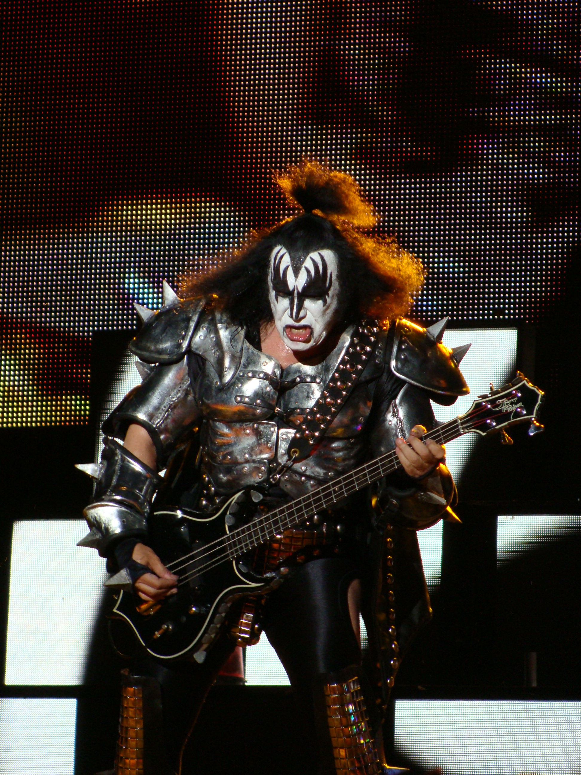 Gene Simmons, en una actuación del grupo KISS en Vitoria-Gasteiz, en el Azkena Rock Festival.